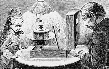 Праксиноскоп